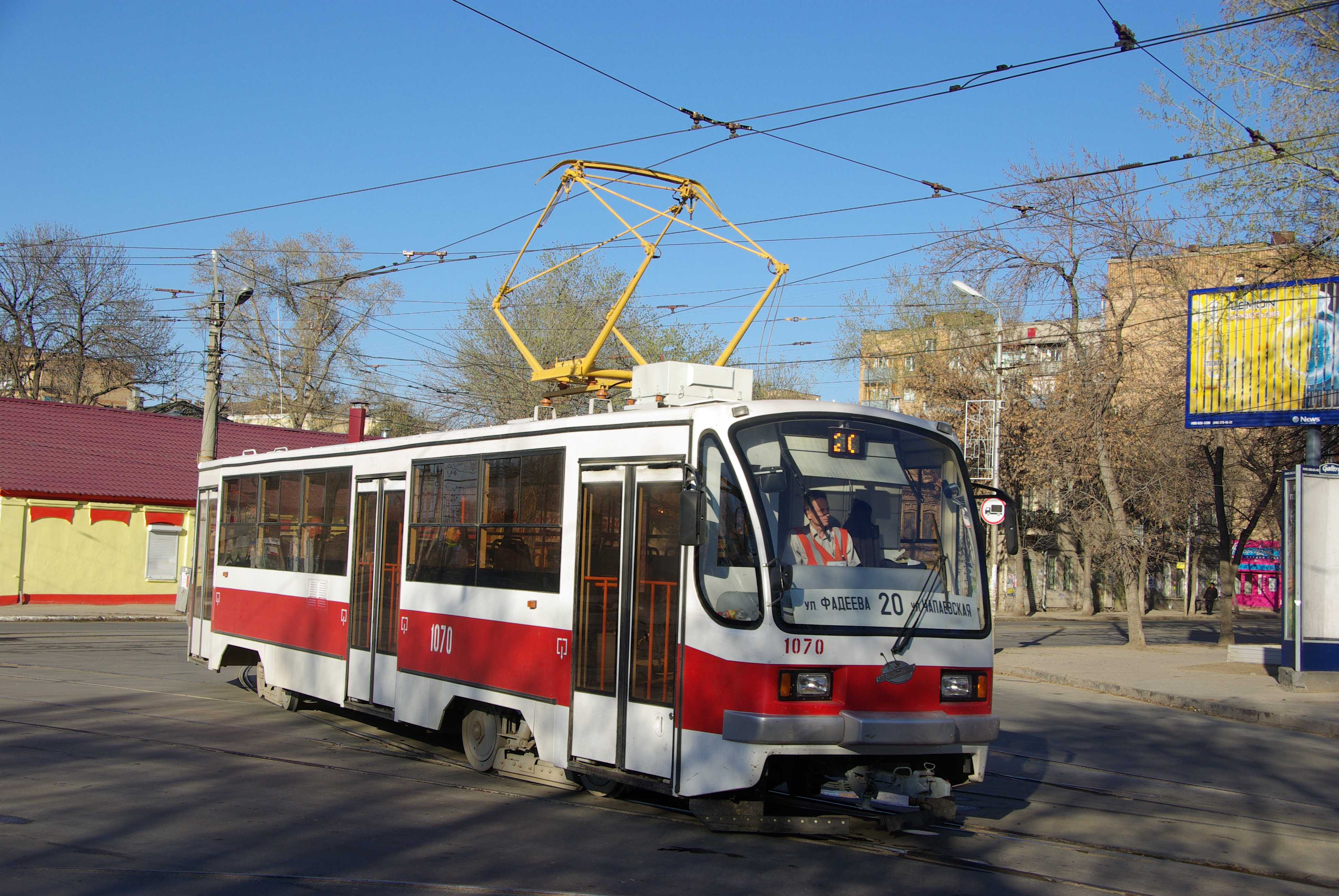 Samara tram 71-405 1070_20090502_638